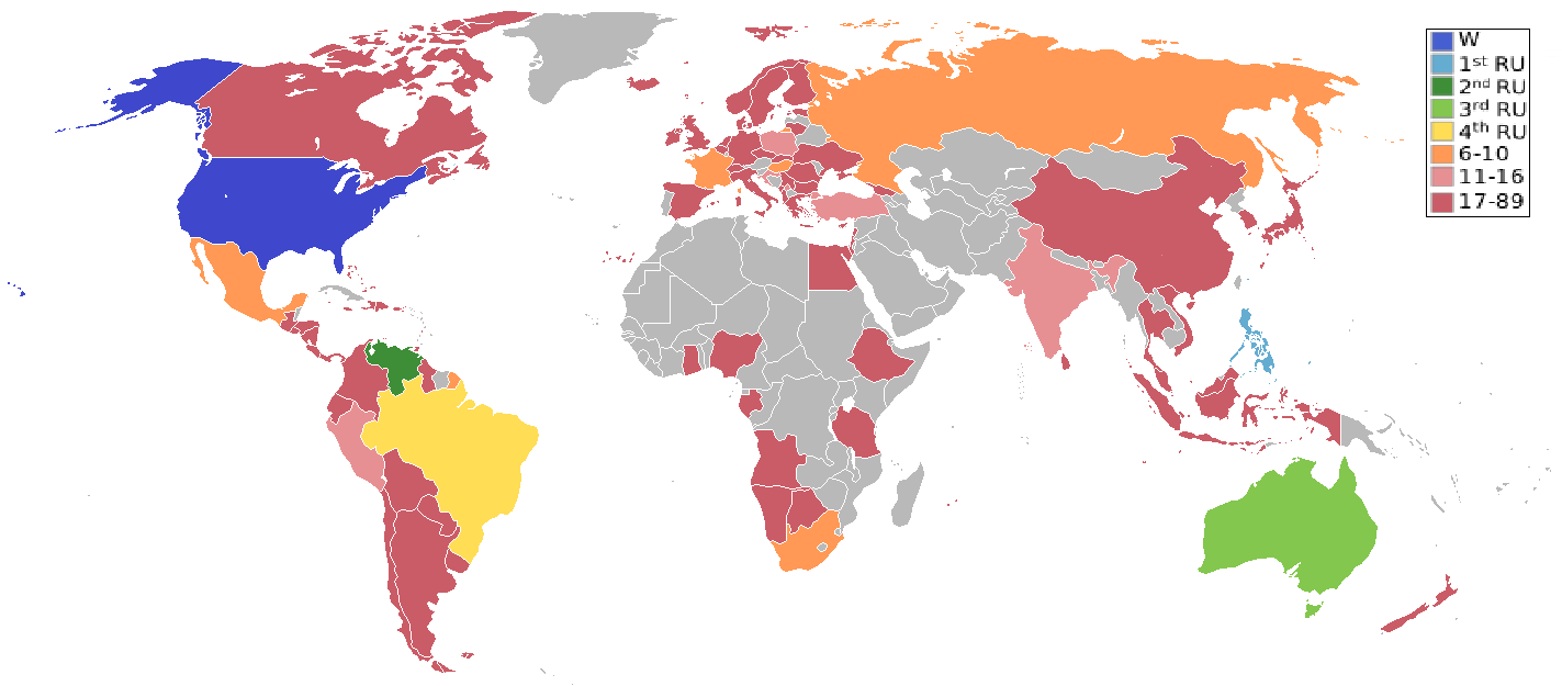 blablablabla